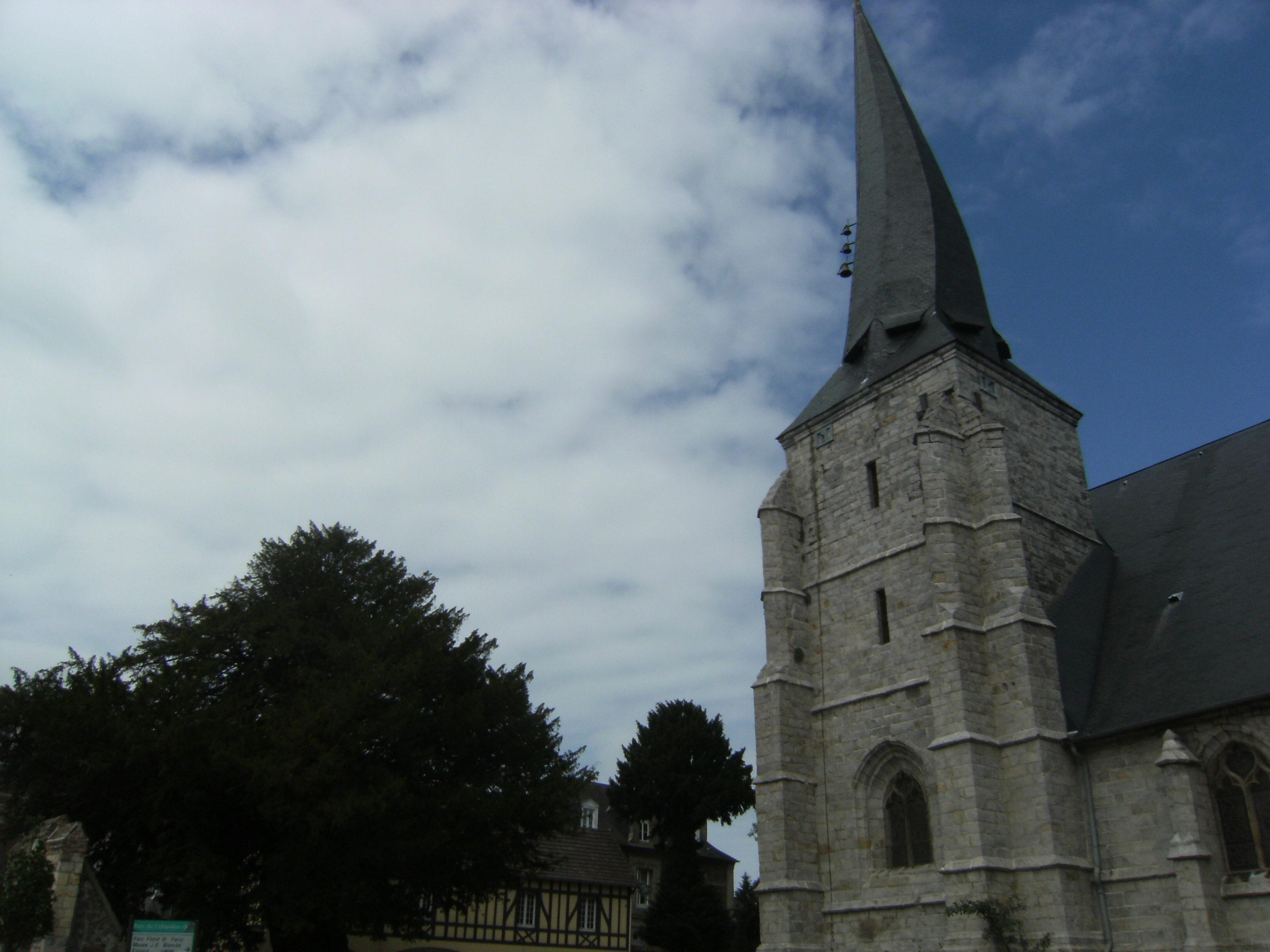 Eglise Saint Ouen et l'if millénaire du village d'Offranville (Seine Maritime, France).